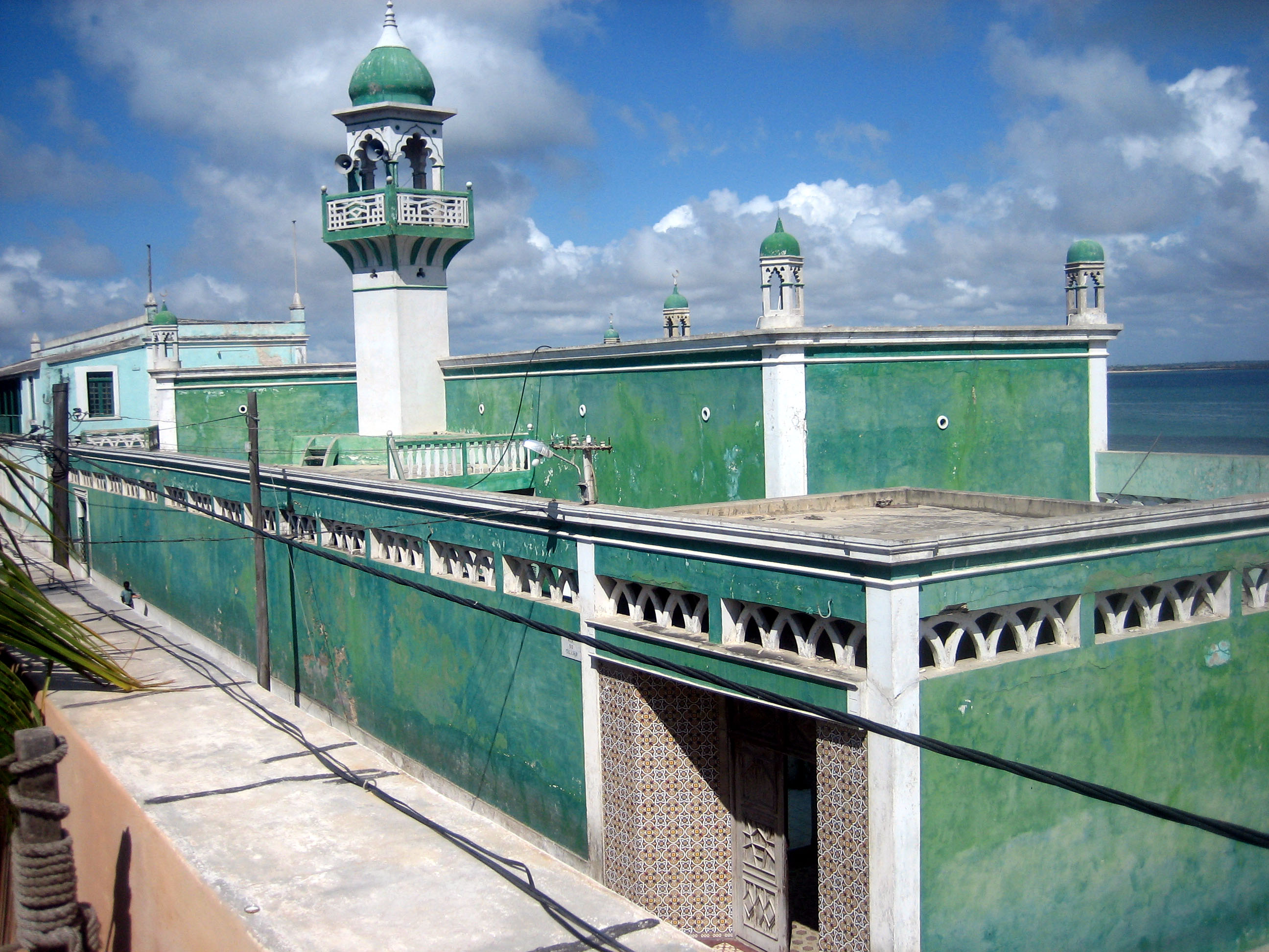 Mosque in Mozambique Island